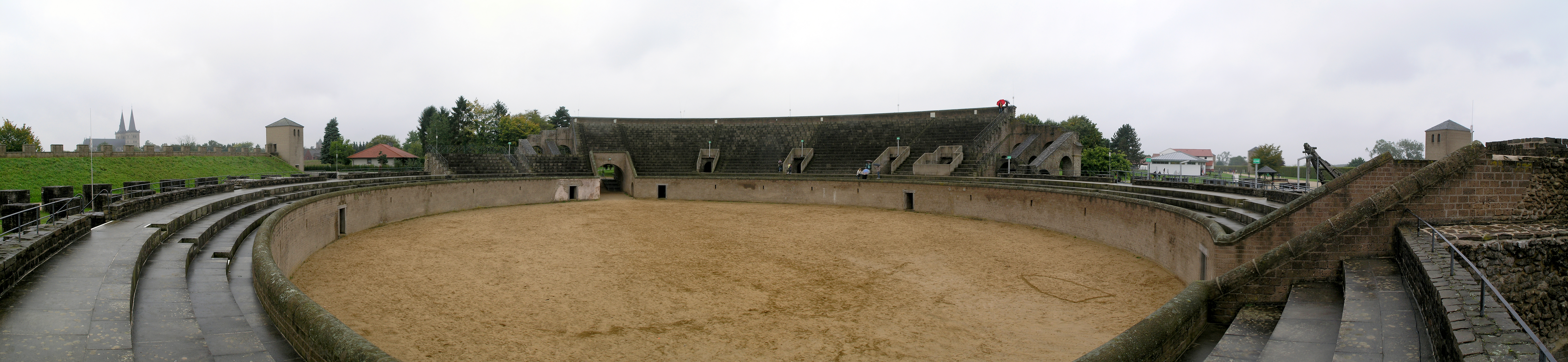 römisches Amphitheater in Xanten, NRW